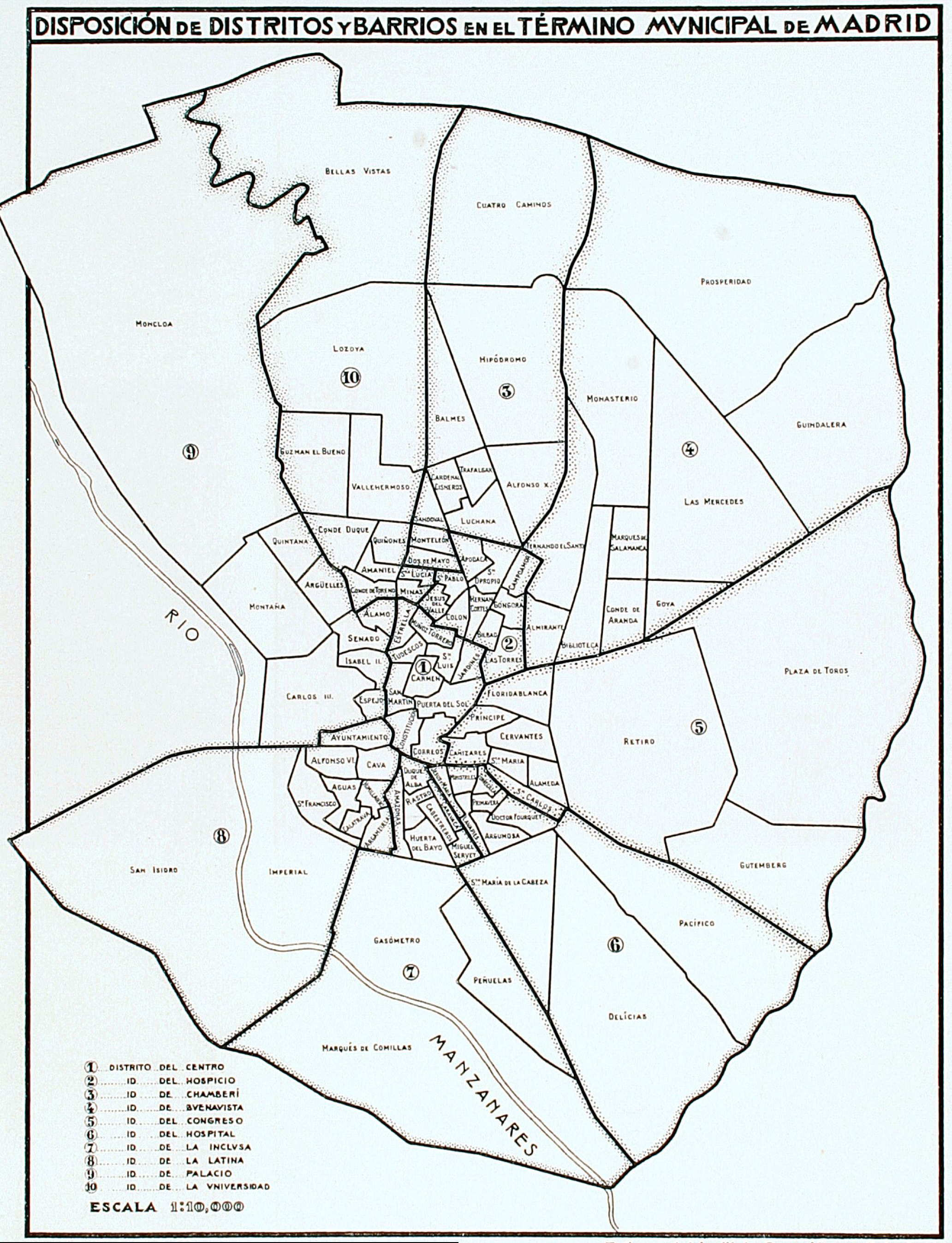 Disposición de distritos y barrios en el término municipal de Madrid. Publicado en julio de 1929 por el Ayuntamiento de Madrid para permitir la elaboración de propuestas para el concurso internacional de reordenación de Madrid